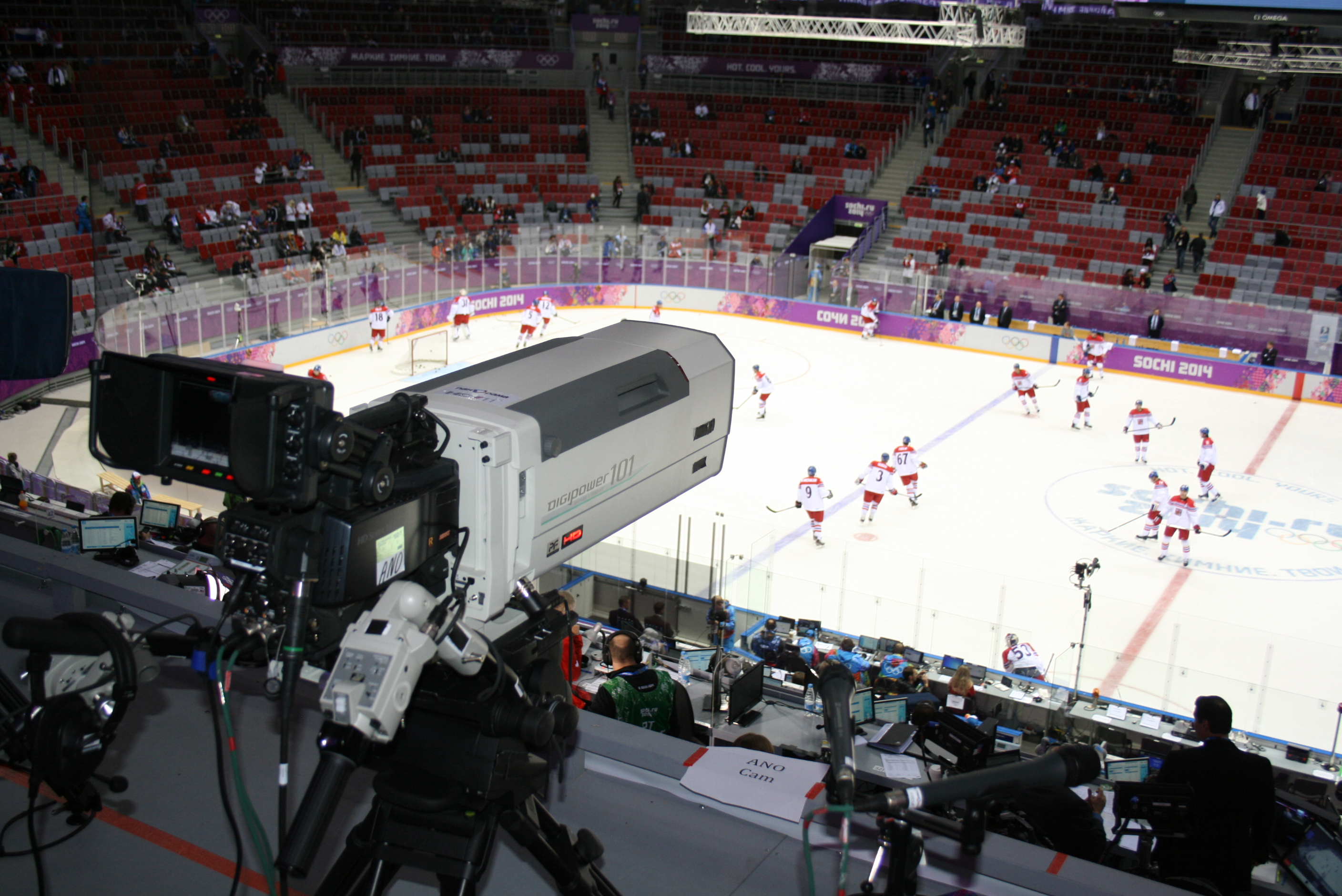 101-кратный объектив FUJINON. Съемка Олимпийских игр в Сочи